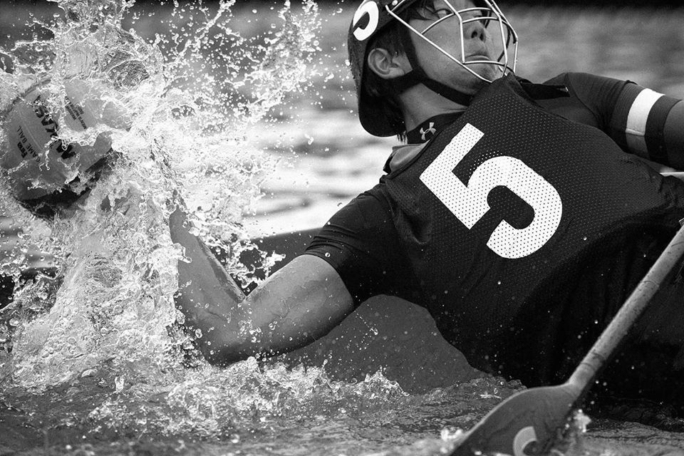 木村亮太